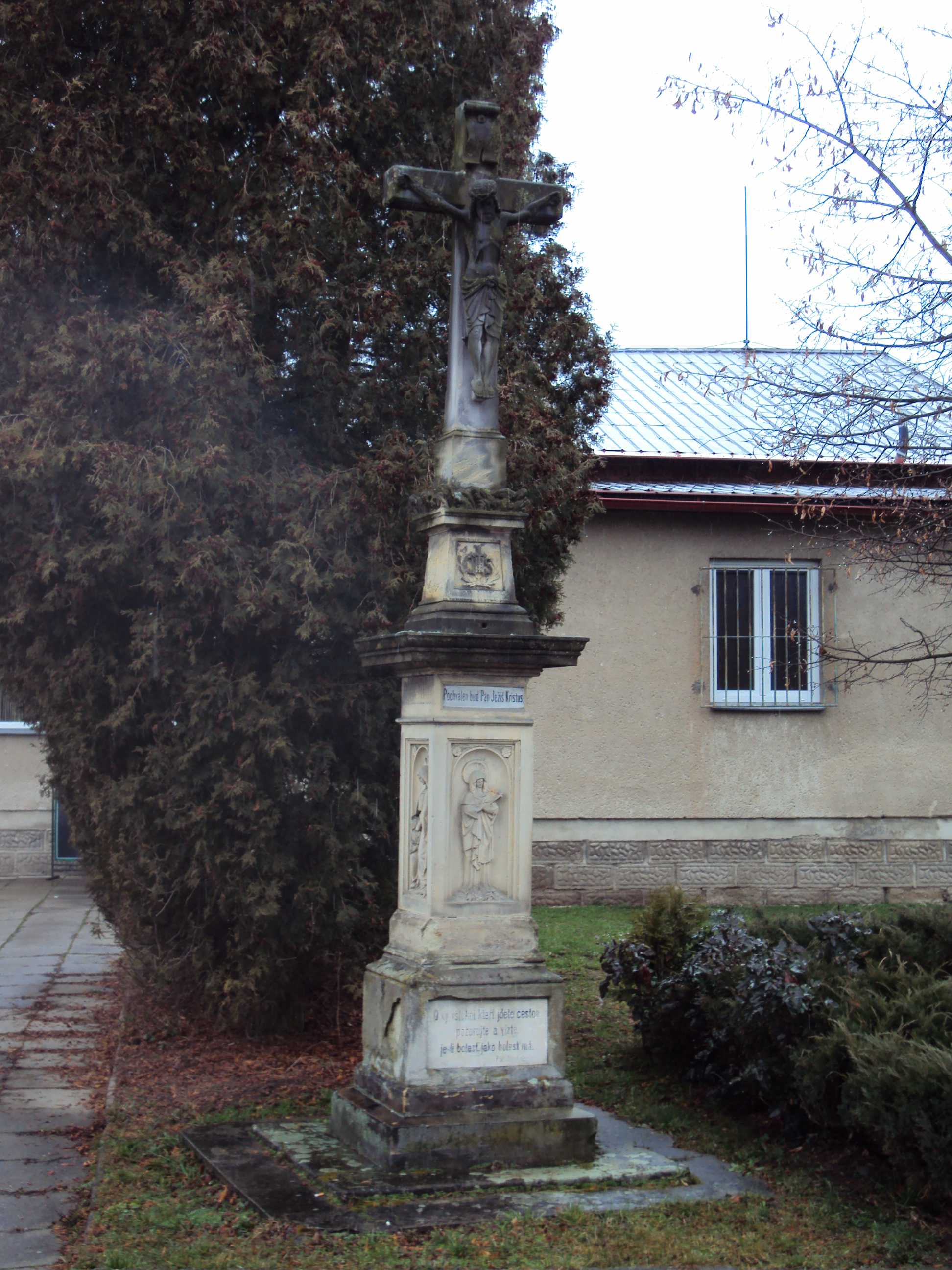 Bohutín křížek